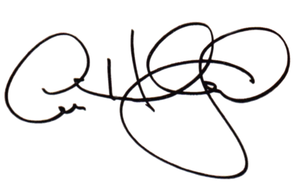 Firma de la actriz estadounidense Anne Hathaway.